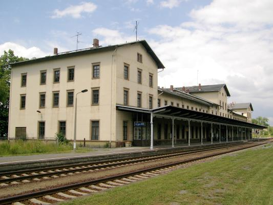 Bahnhof Ebersbach/Sachsen